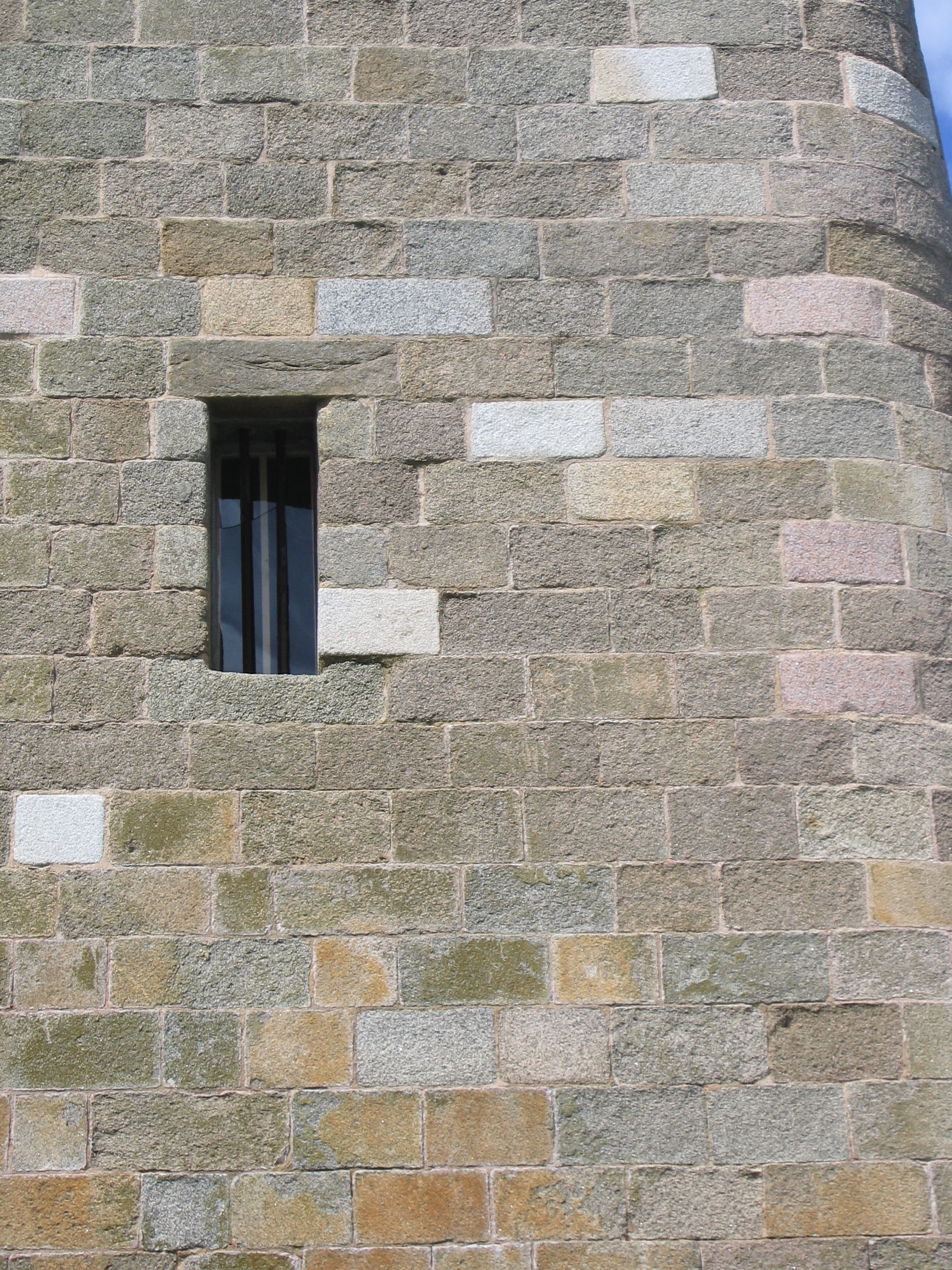 les pierres employées sont de différentes provenances (les couleurs)